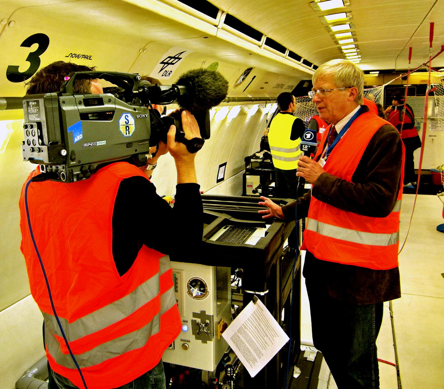 Michael Veith im Interview vor einem Parabelflug